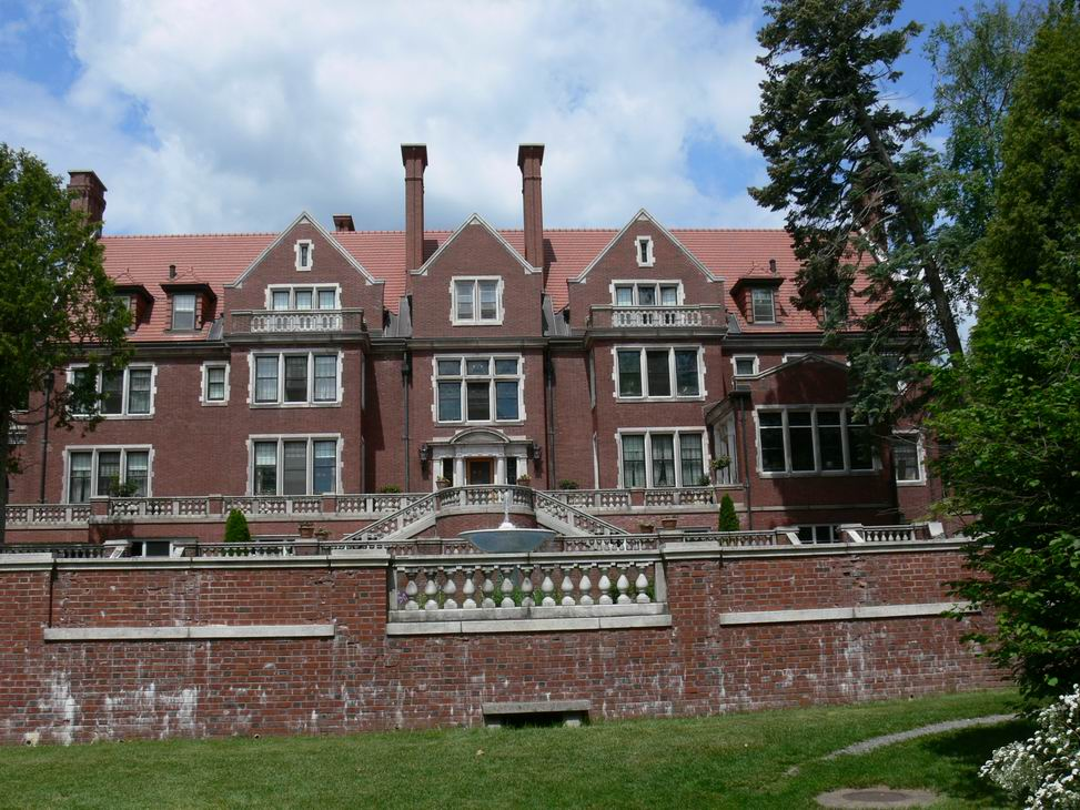 Glensheen Mansion, saját kép